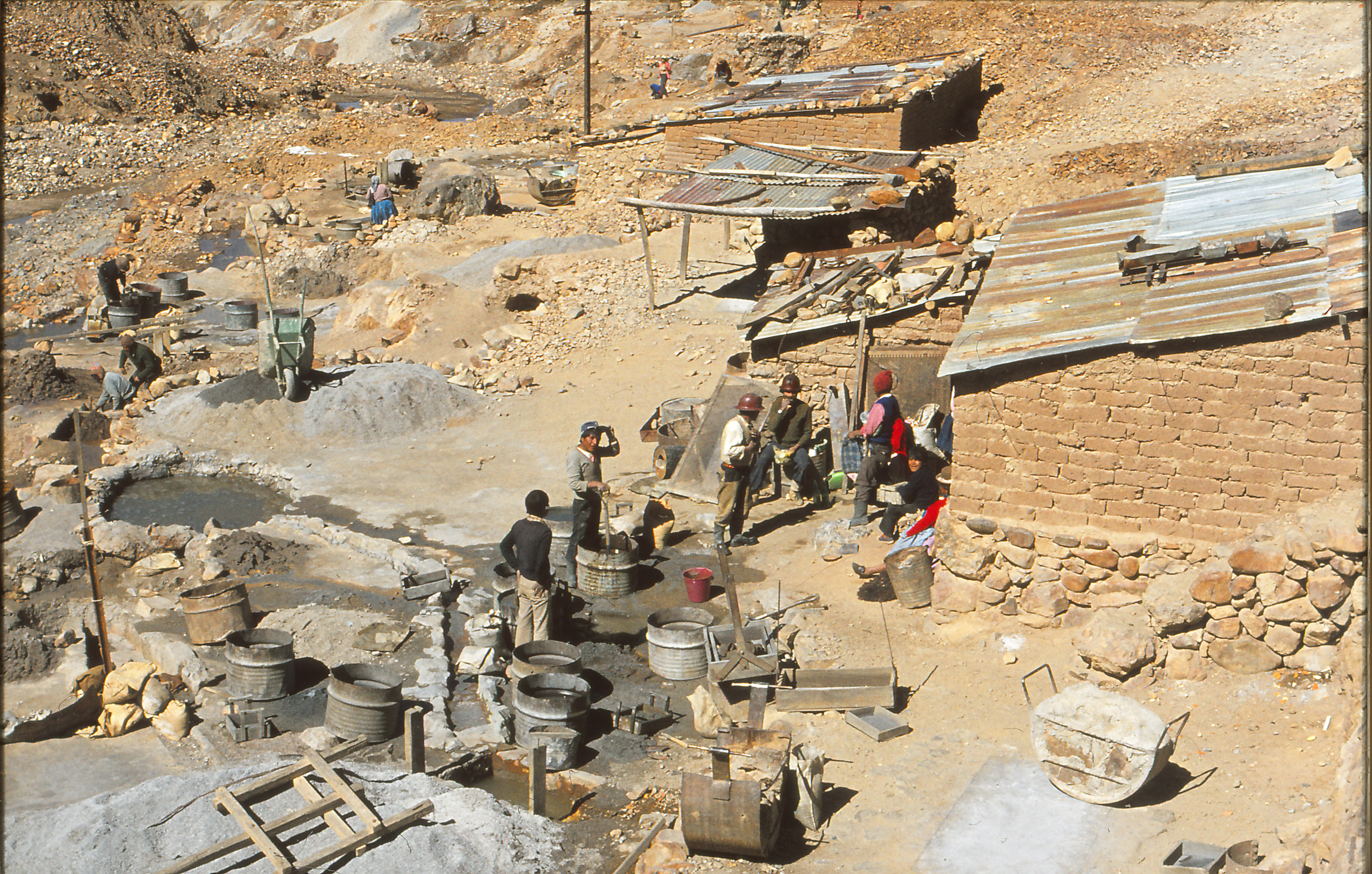 Zinnwäscher bei Uncia, Bolivien